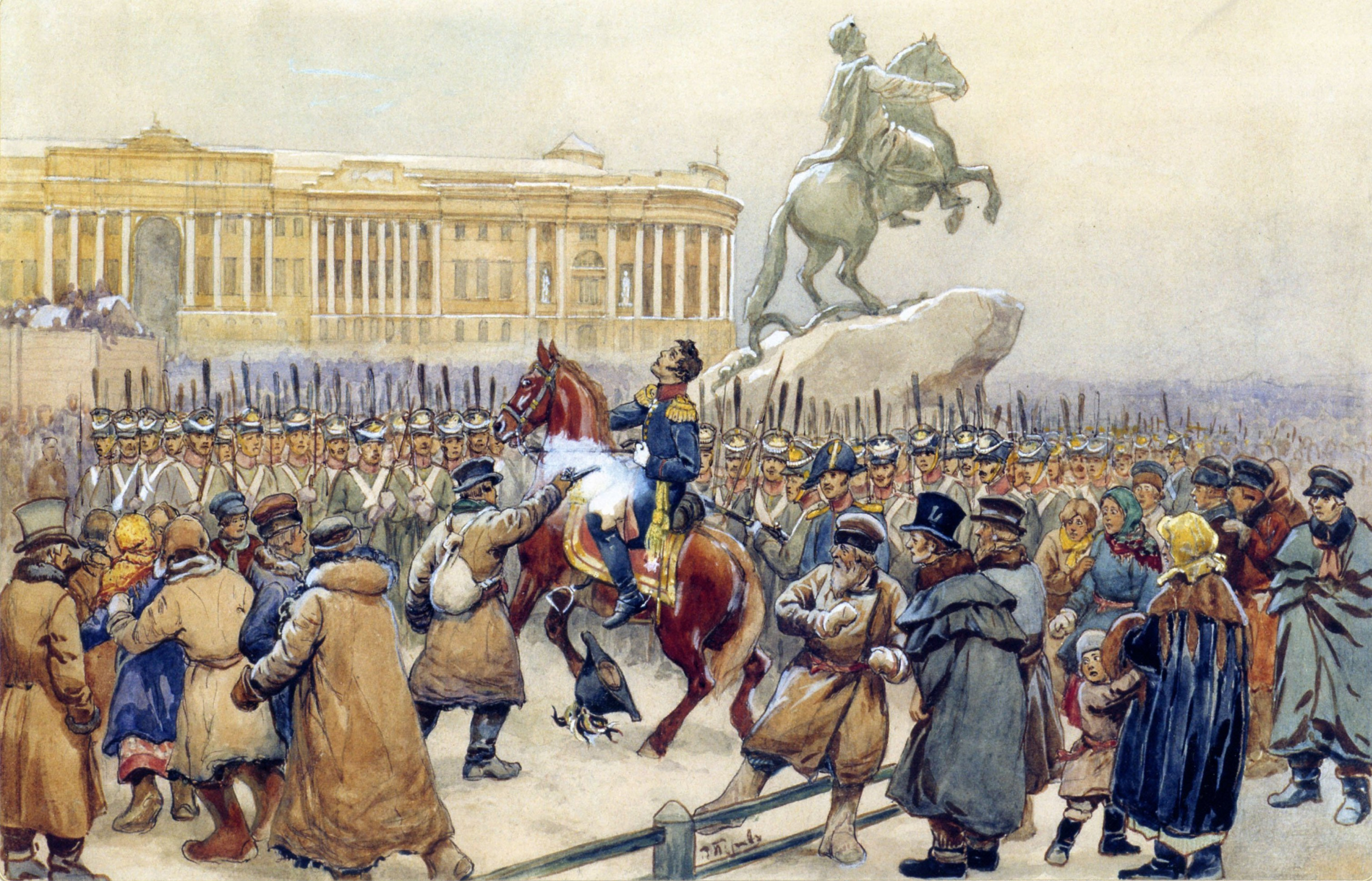 Восстание декабристов. Бумага, акварель. 36 х 52,8 см. Государственный музей истории религии